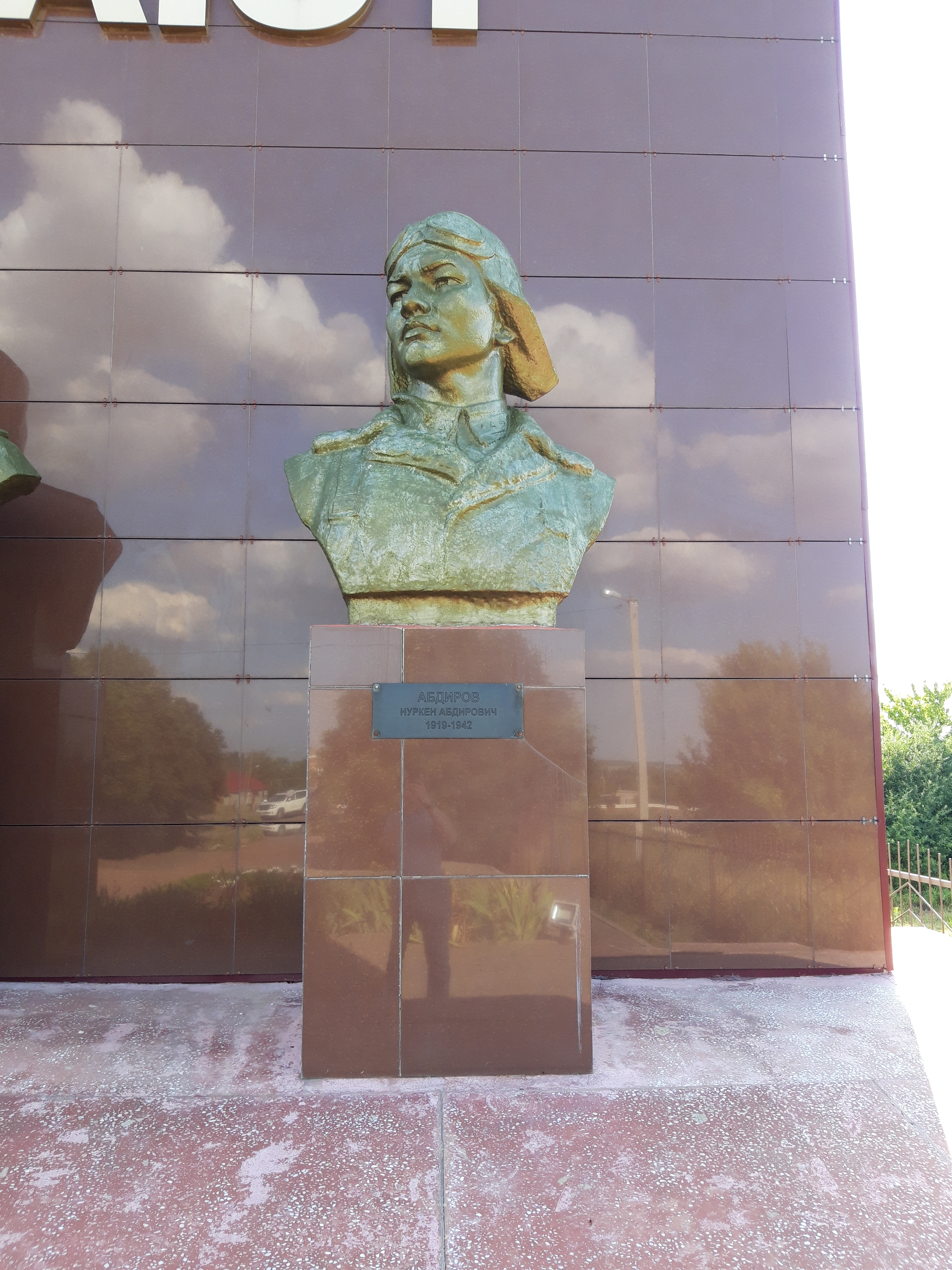 Бюст Н.Абдирова в станице Боковской Ростовской области